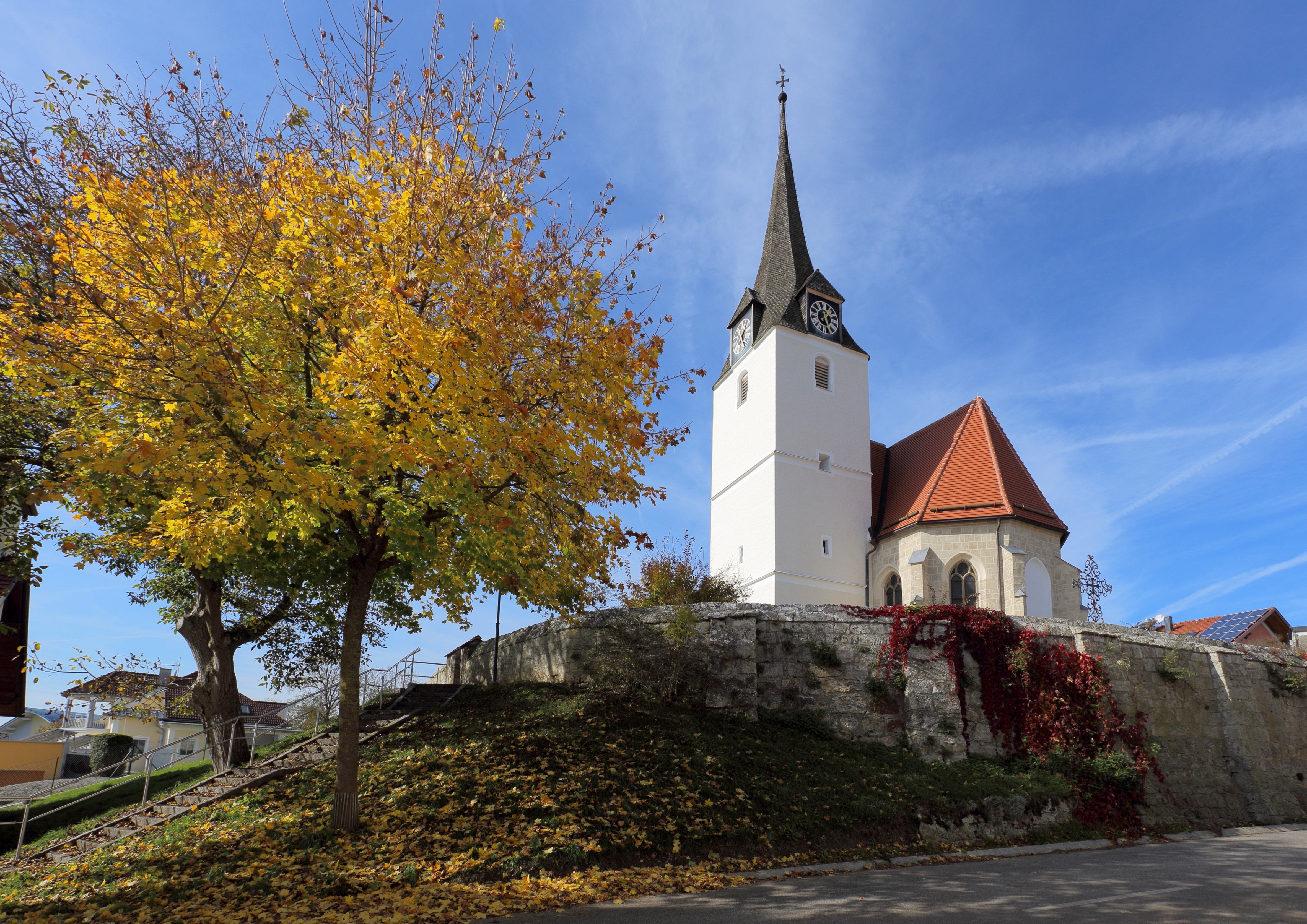 Südostansicht der katholischen Pfarrkirche hl. Margarethe in der oberösterreichischen Gemeinde Mörschwang. Ein gotischer Sakralbau, der 1523 geweiht wurde, mit einem mächtigen Turm im südlichen Chorwinkel, einem einschiffigen, dreijochigen Langhaus und einem gleich breiten einjochigen Chor.